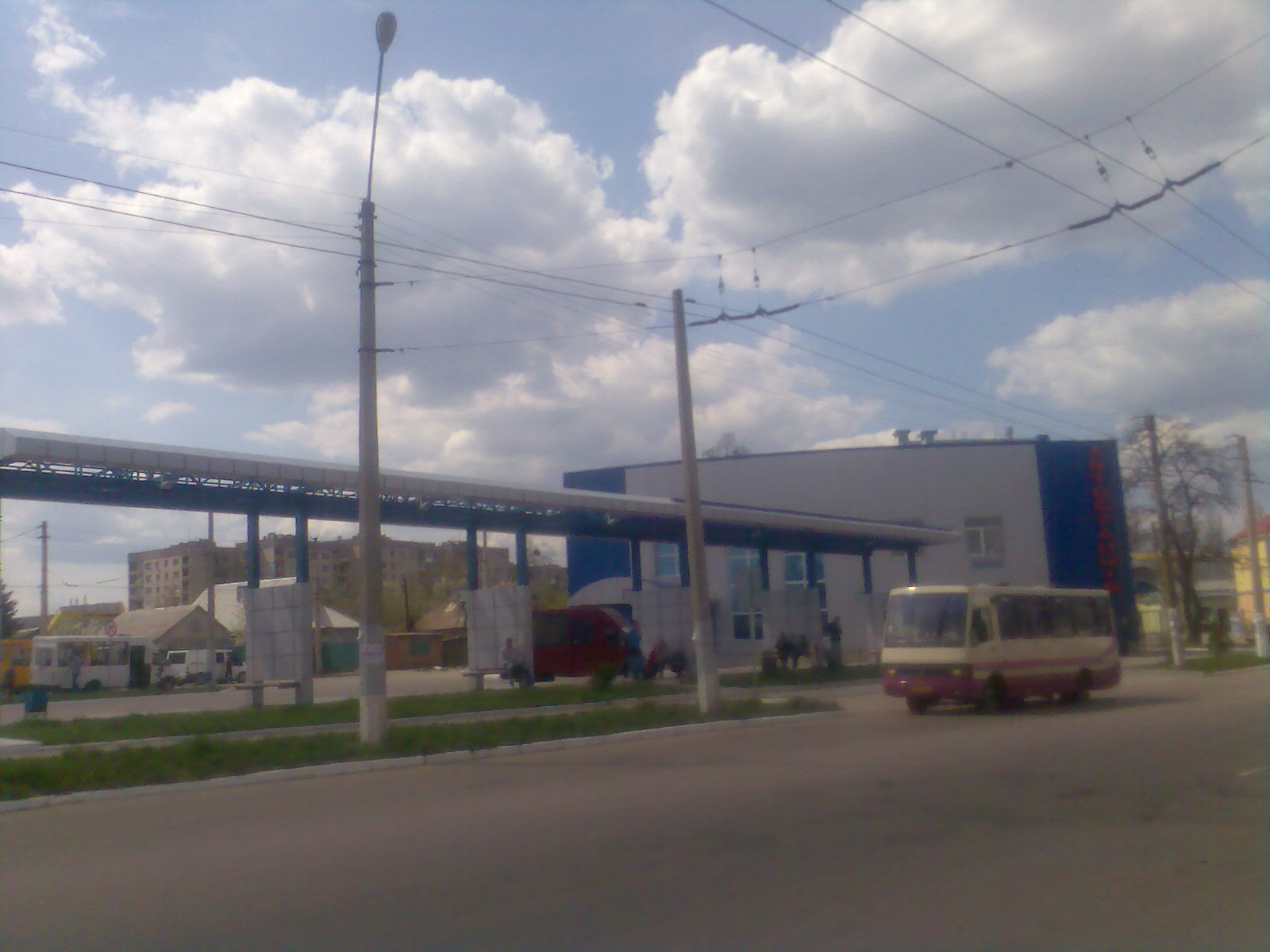 Лисичанська автостанція № 2